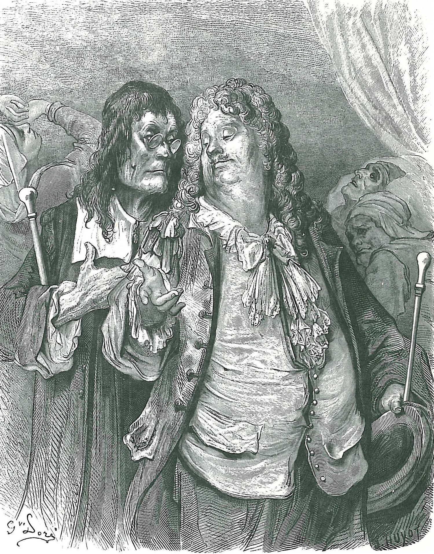 illustration for Jean de La Fontaine's fables by Gustave Doré